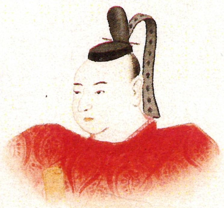 板倉勝従の肖像。